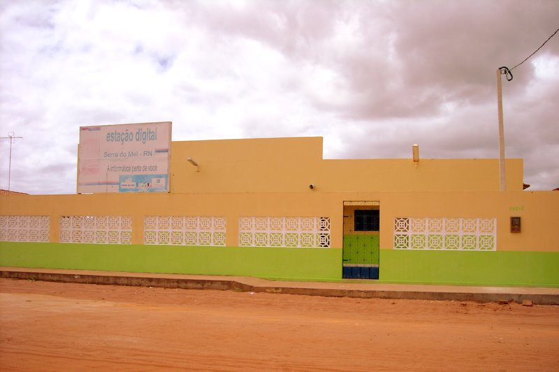 Prédio da Estação Digital de Serra do Mel